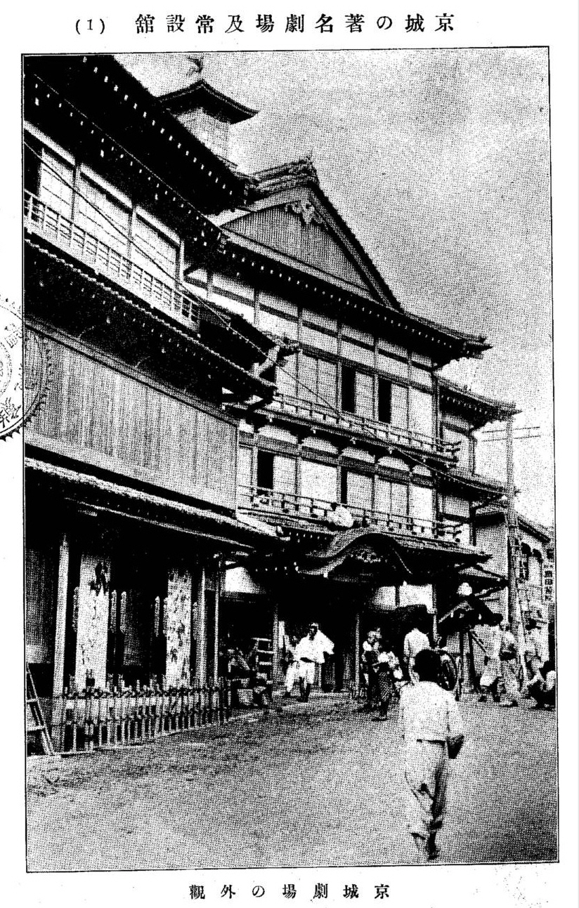 京城府の寄席(のちに映画館)、京城劇場、1922年